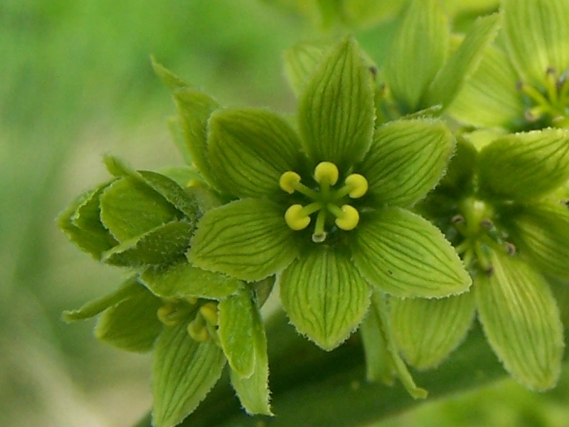 Veratrum lobelianum (pl. ciemiężyca zielona)